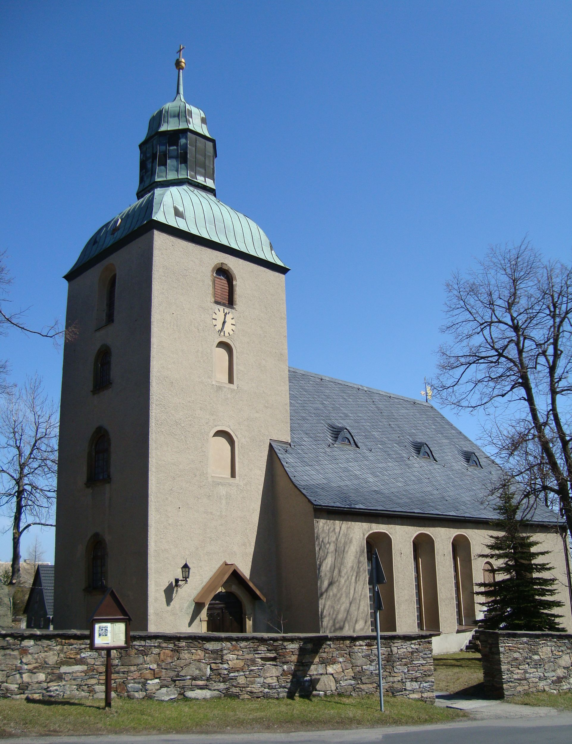 Pfarrkirche in Satzung